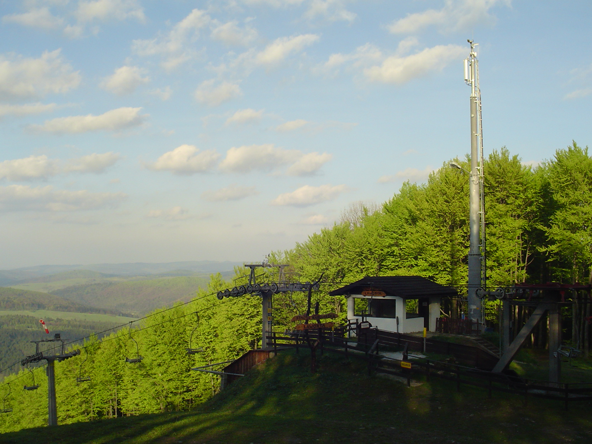 Ustrzyki Dolne, Laworta, Stacja narciarska, Wiosna 2